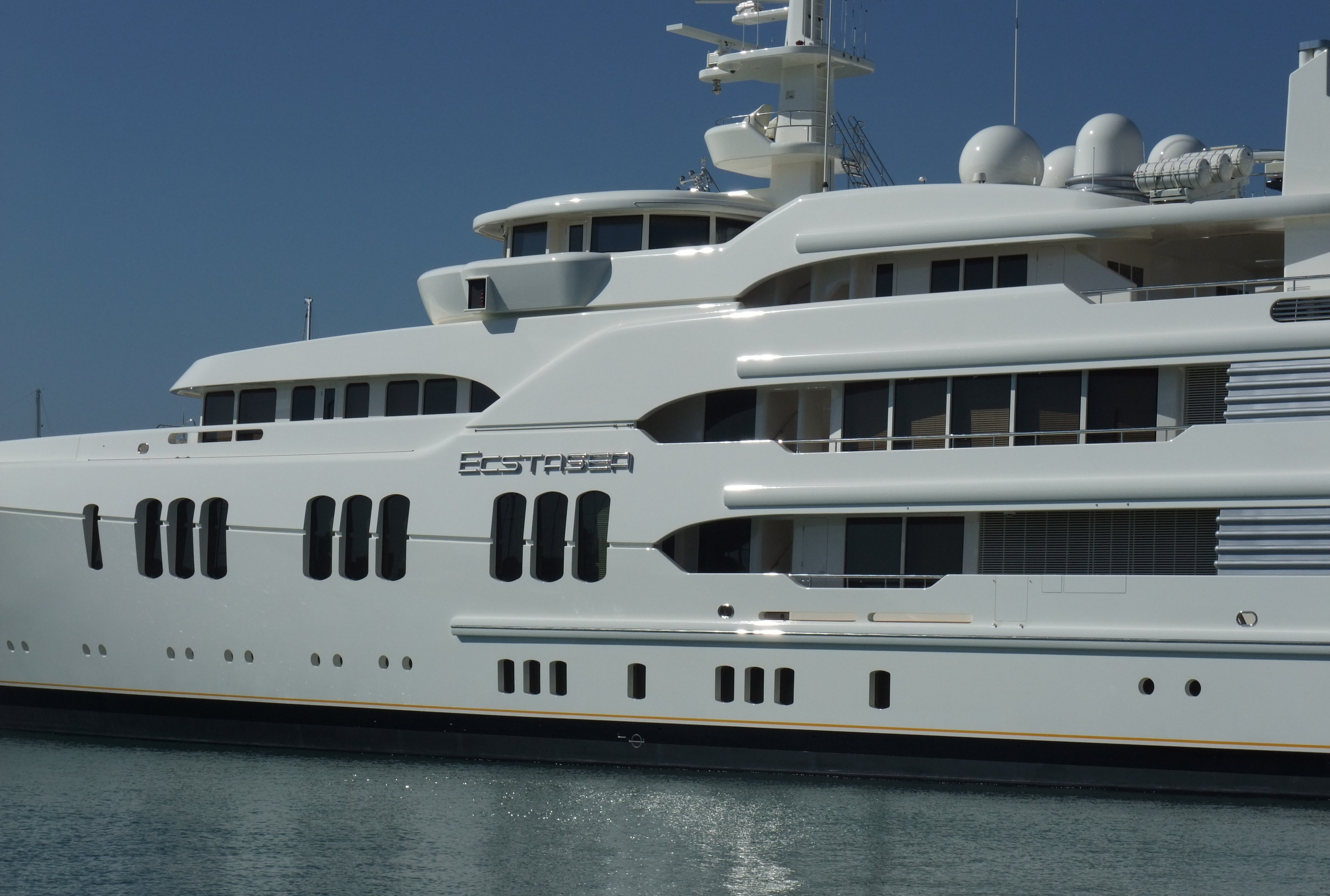 Le yacht Ecstasea (86 m). Ce bateau de luxe construit par Feadship / Van Lent faisait partie des 30 plus grands yachts privés du monde lors de son lancement en 2004.